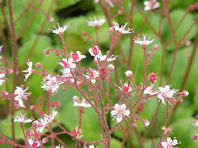 Species: Saxifraga umbrosa Family: Saxifragaceae Image No. 1